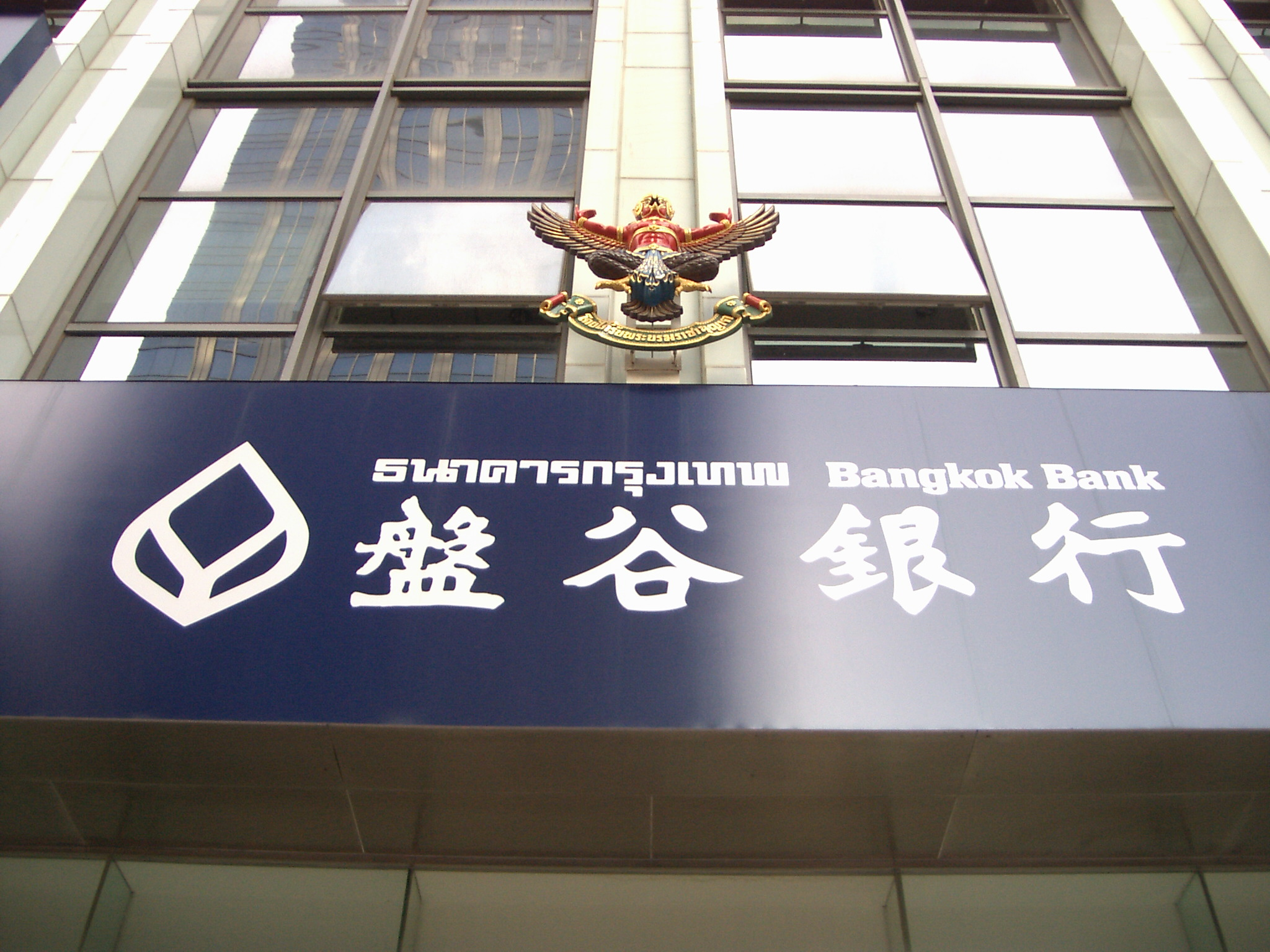 中文（中国大陆）: 盘谷银行深圳分行看板。